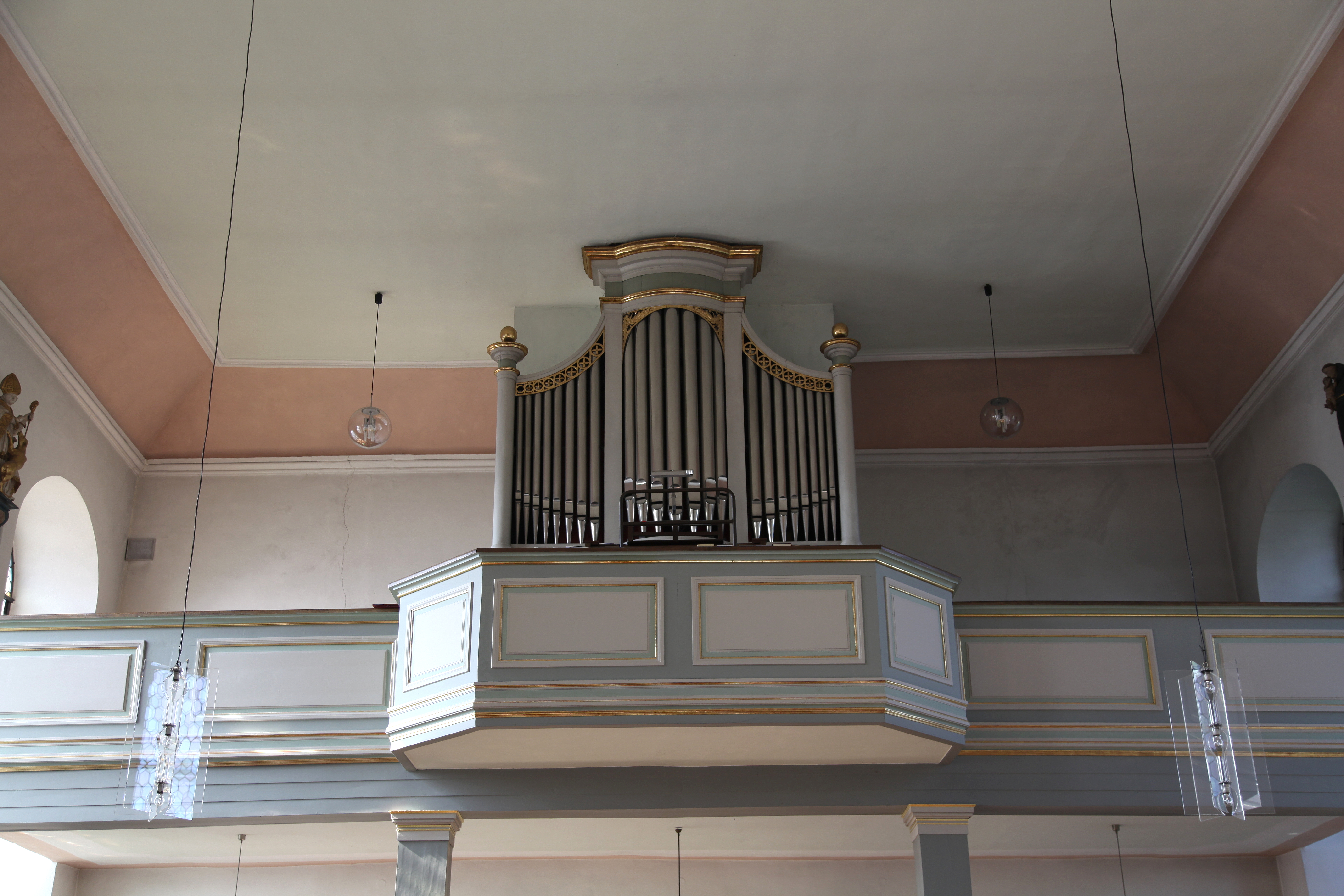 St. Johannes Baptist, Alter Fährweg in Gimbte, Greven